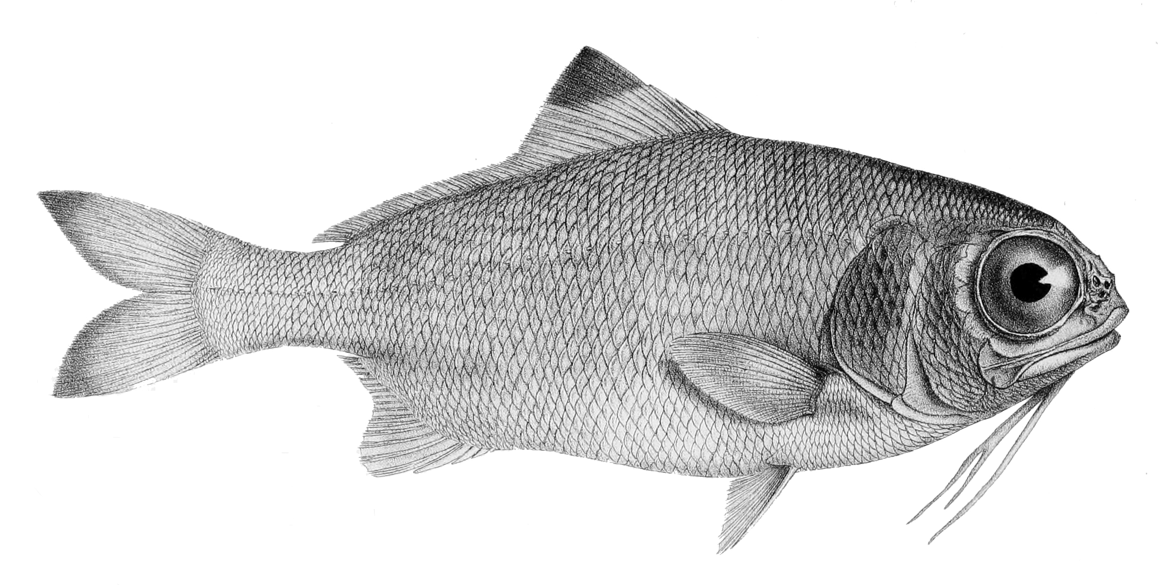 Polymixia nobilis